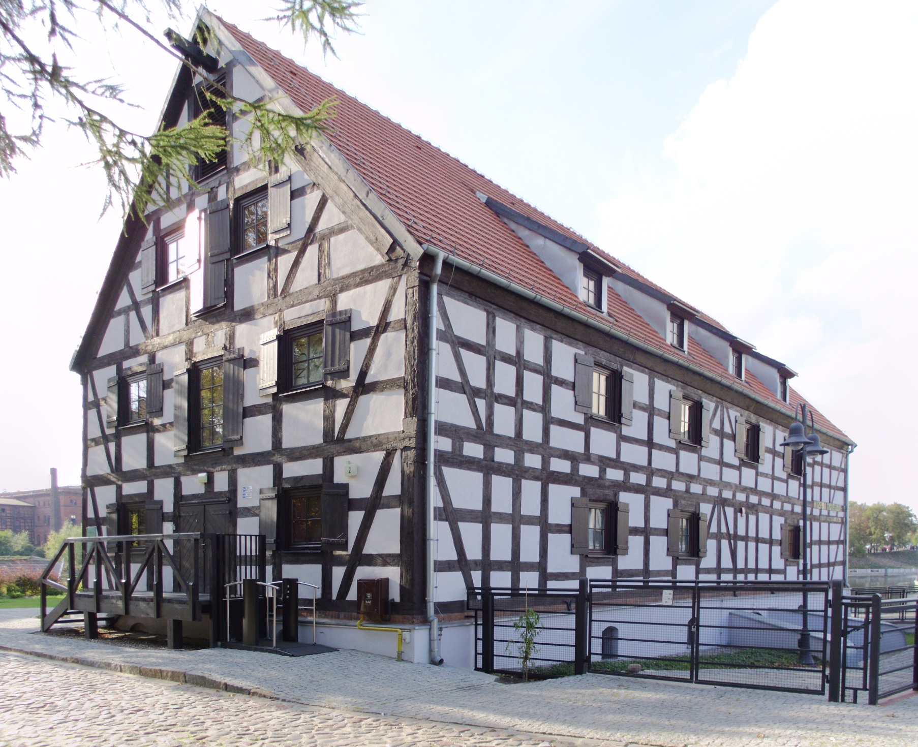 zespół Wyspy Młyńskiej: spichrz, ul. Mennica 1/2, szach., 1789-1799 Bydgoszcz, miasto Bydgoszcz